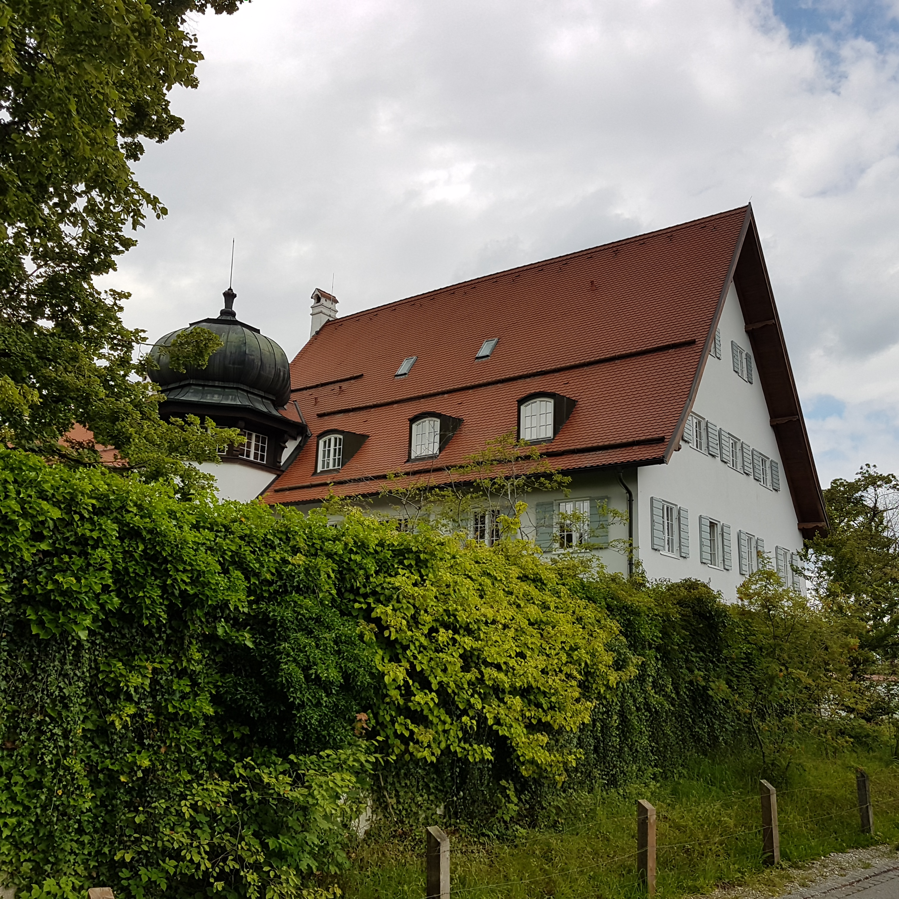 Gutshof